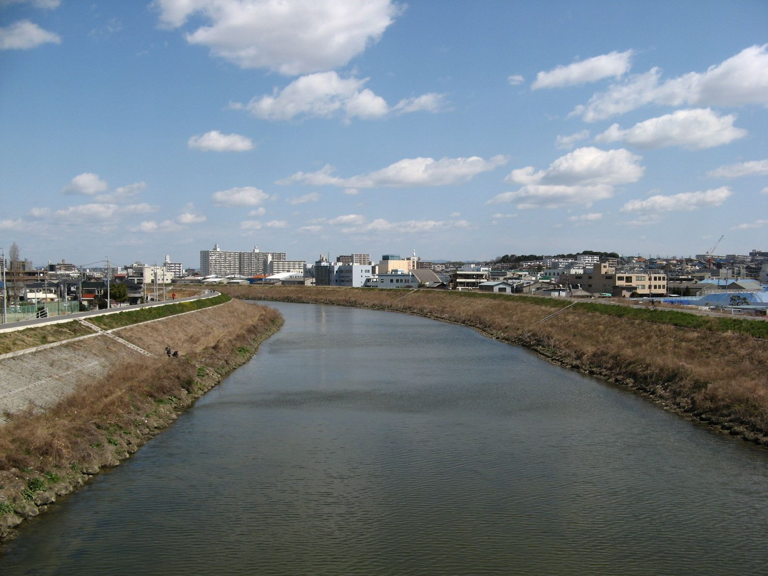 天白橋から北望した天白川。左手が名古屋市南区。右手が同緑区鳴海町。Bakkai撮影。レタッチ済。地図はこちら。